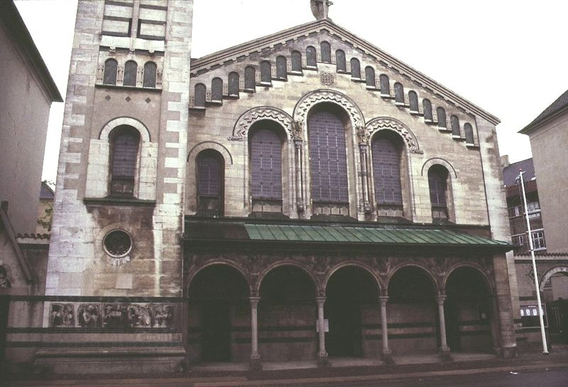 Kristkirken i Danmark. Sydfacade